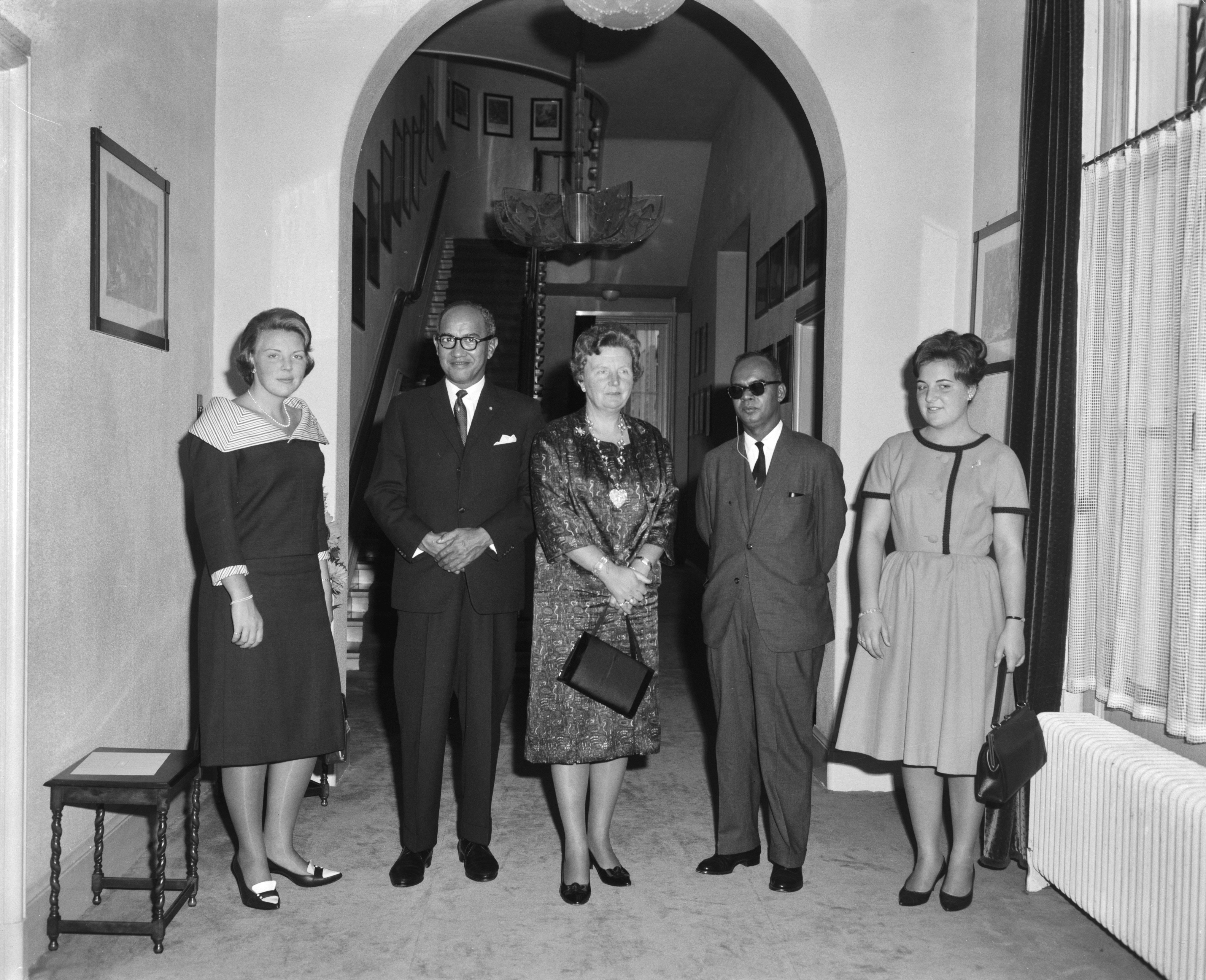 Collectie / Archief : Fotocollectie Anefo Reportage / Serie : [ onbekend ] Beschrijving : Koningin Juliana ontvangt op paleis Soestdijk de premier van Trinidad, Eric Williams, en de premier van Suriname V.l.n.r. prinses Beatrix, premier Emanuels van Suriname, koningin Juliana, premier Williams van Trinidad en prinses Margriet Datum : 3 oktober 1962 Locatie : Baarn, Utrecht (provincie) Trefwoorden : groepsportretten, koninginnen, ministers-presidenten, paleizen, prinsessen Persoonsnaam : Beatrix (kroonprinses Nederland), Emanuels, Severinus D., Juliana (koningin Nederland), Margriet (prinses Nederland), Williams, Eric Instellingsnaam : Paleis Soestdijk Fotograaf : Bilsen, Joop van / Anefo, [onbekend] Auteursrechthebbende : Nationaal Archief Materiaalsoort : Negatief (zwart/wit) Nummer archiefinventaris : bekijk toegang 2.24.01.04 Bestanddeelnummer : 914-3737